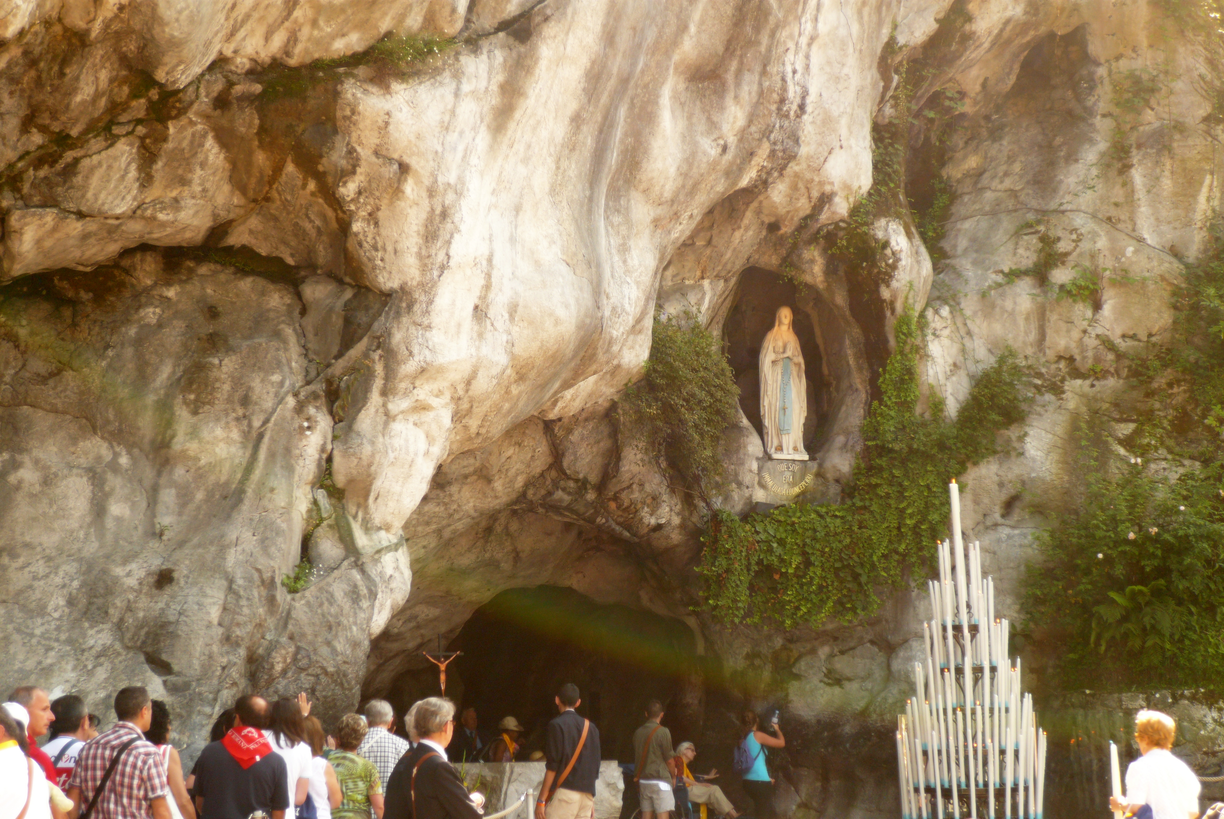 La Grotte de Lourdes